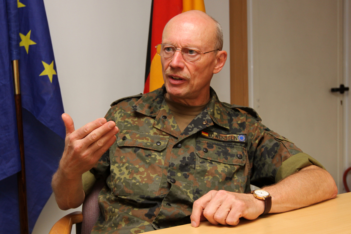 Kdr DEU EinsKtgt und Chef des Stabes - HQ EUFOR, Sarajewo, BiH